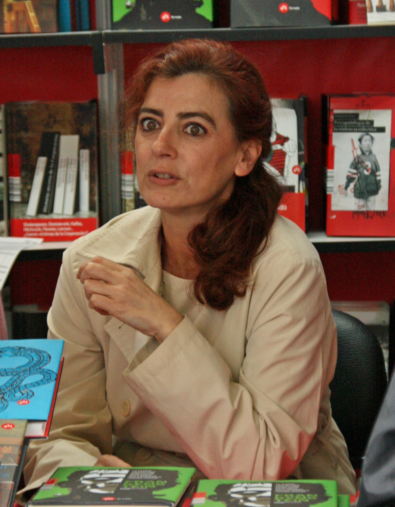 Ángeles Caso en la Feria del Libro de Madrid, 31 de mayo de 2008